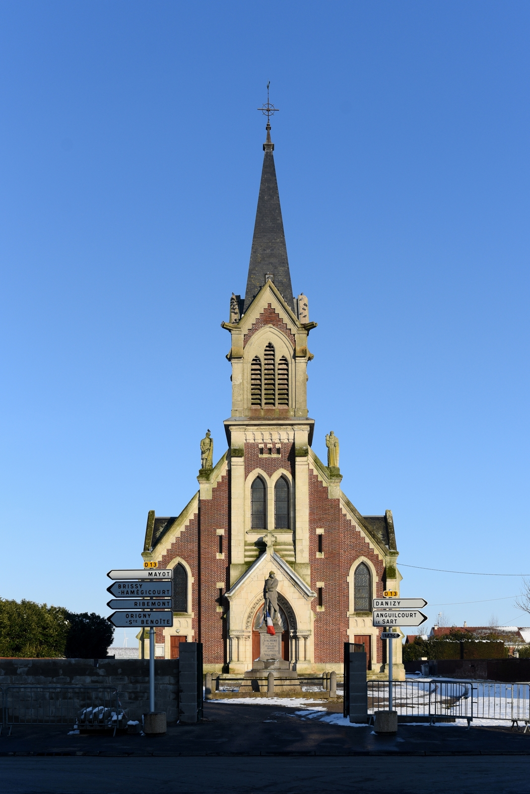 Façade